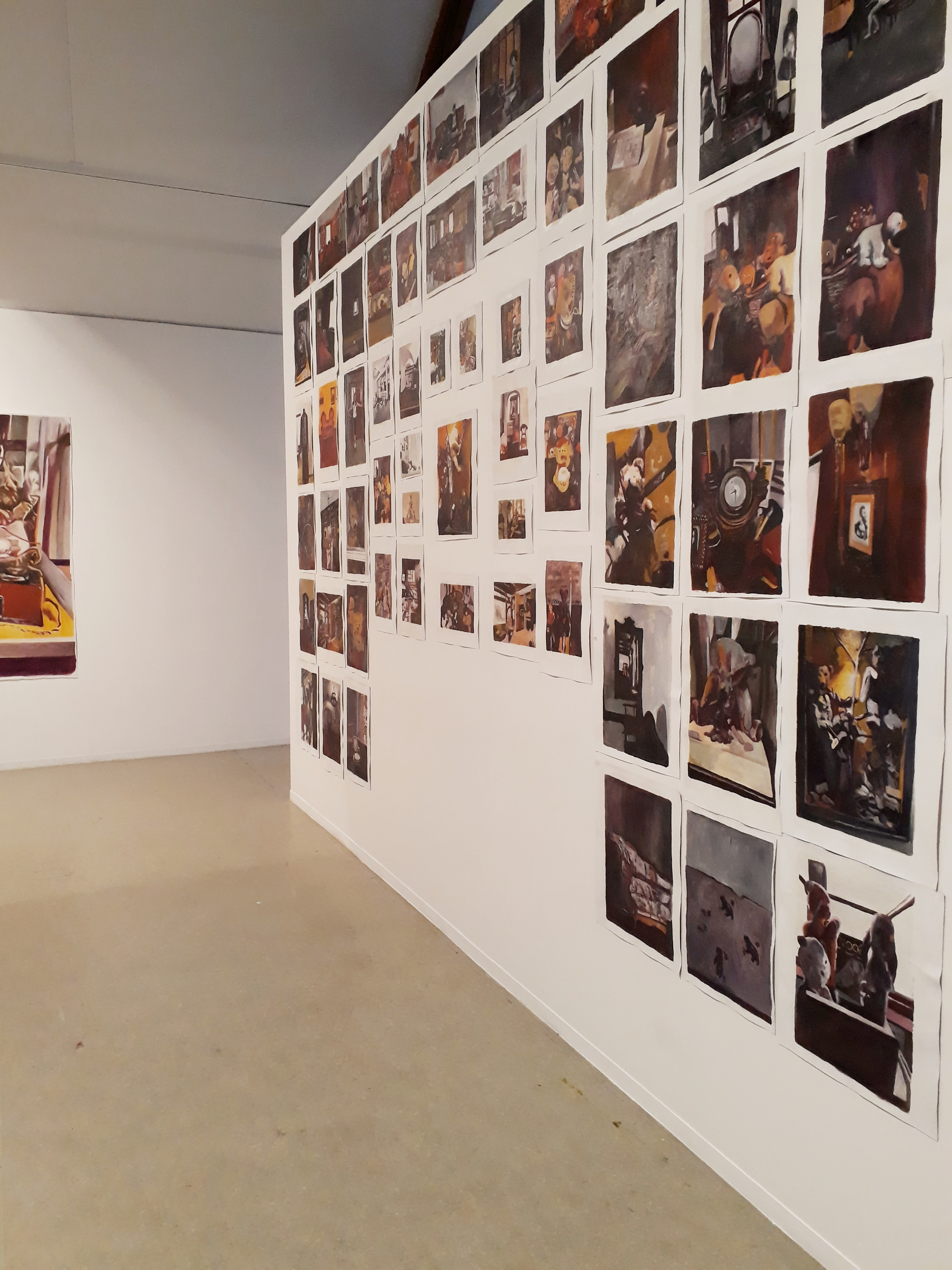 Mihaela Mihalache, Solo exhibition at Annexe du Château de Bourglinster Open Space, Bourglinster, Luxembourg, 2019